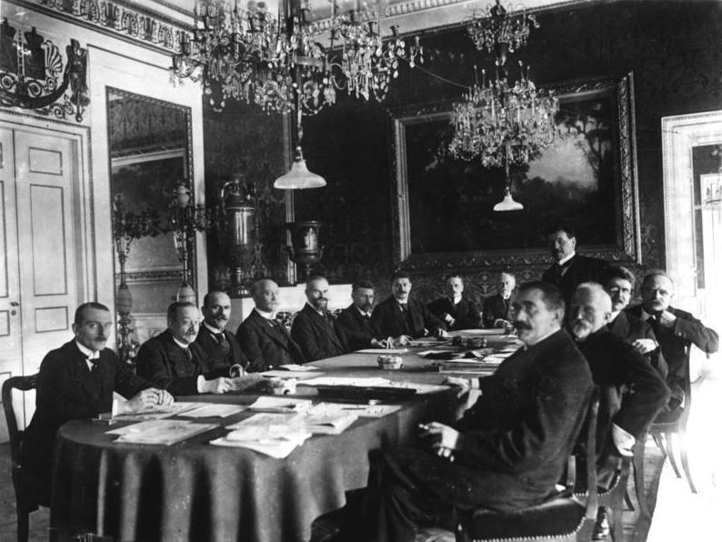 Weimar, Regierung Scheidemann Zentralbild Erste Kabinettssitzung der neuen deutschen Reichsregierung unter Scheidemann am 13.2.1919 in Weimar. V.l.n.r.: Ulrich Rauscher, Pressechef der Reichsregierung, Robert Schmidt, Ernährung, Eugen Schiffer, Finanzen, Philipp Scheidemann, Reichskanzler, Otto Landsberg, Justiz, Rudolf Wissell, Wirtschaft, Gustav Bauer, Arbeit, Ulrich Graf von Brockdorff-Rantzau, Auswärtiges, Eduard David, ohne Portefeuille, Hugo Preuss, Inneres, Johann Giesberts, Post, Johannes Bell, Kolonien, Georg Gothein, Schatz, Gustav Noske, Reichswehr Information added by Wikimedia users.Kabinett Scheidemann 13. Februar 1919 – 20. Juni 1919